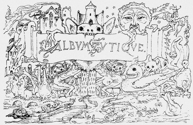 Abum Zutique, 1871, page de titre dessinée par Antoinet Cros. Réédité en fac-similé en 1962 (cette copie).